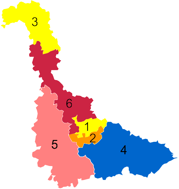 Résultats des élections législatives de la Meurthe-et-Moselle en 2017